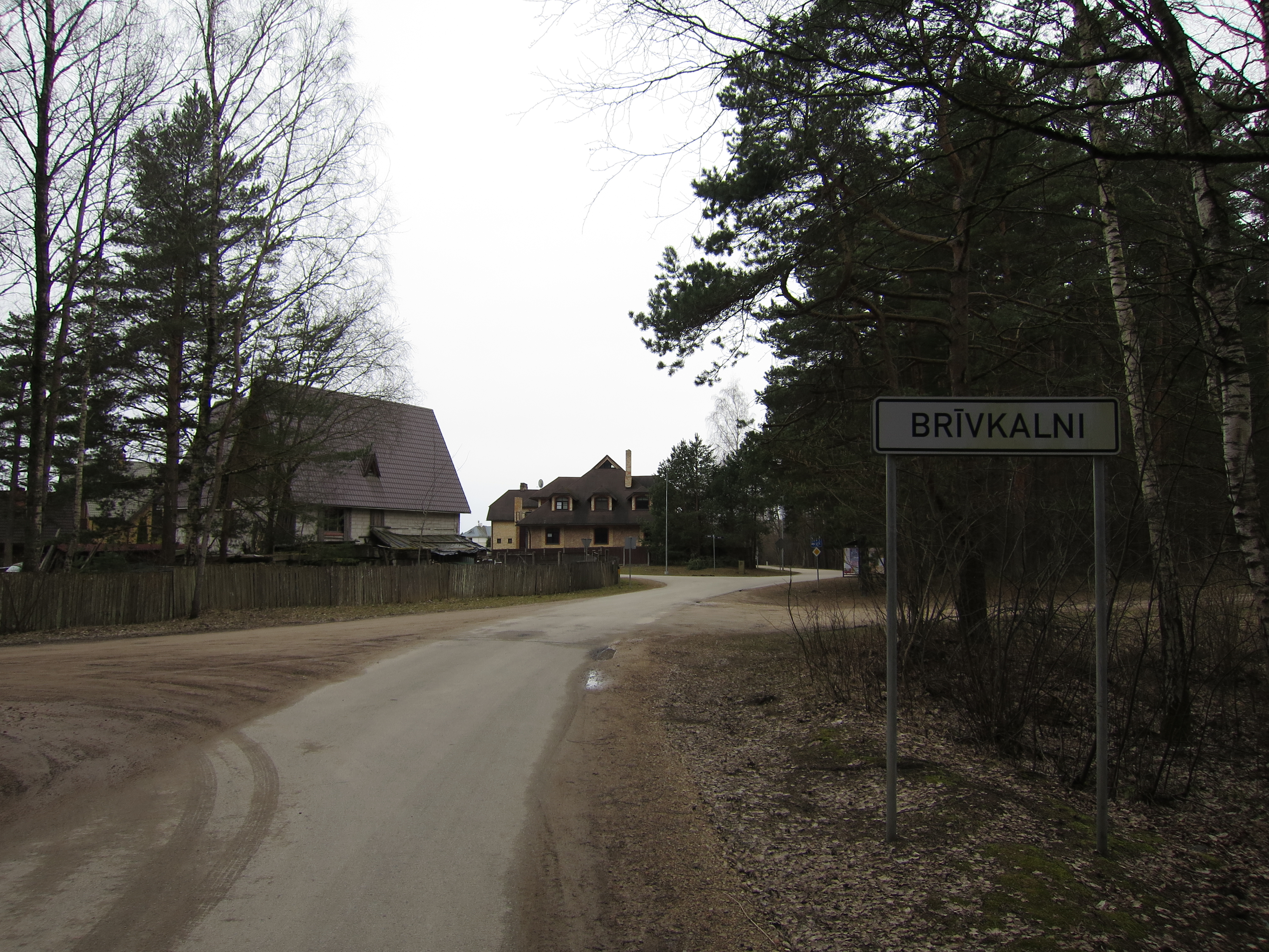 Brīvkalni no Liberu puses